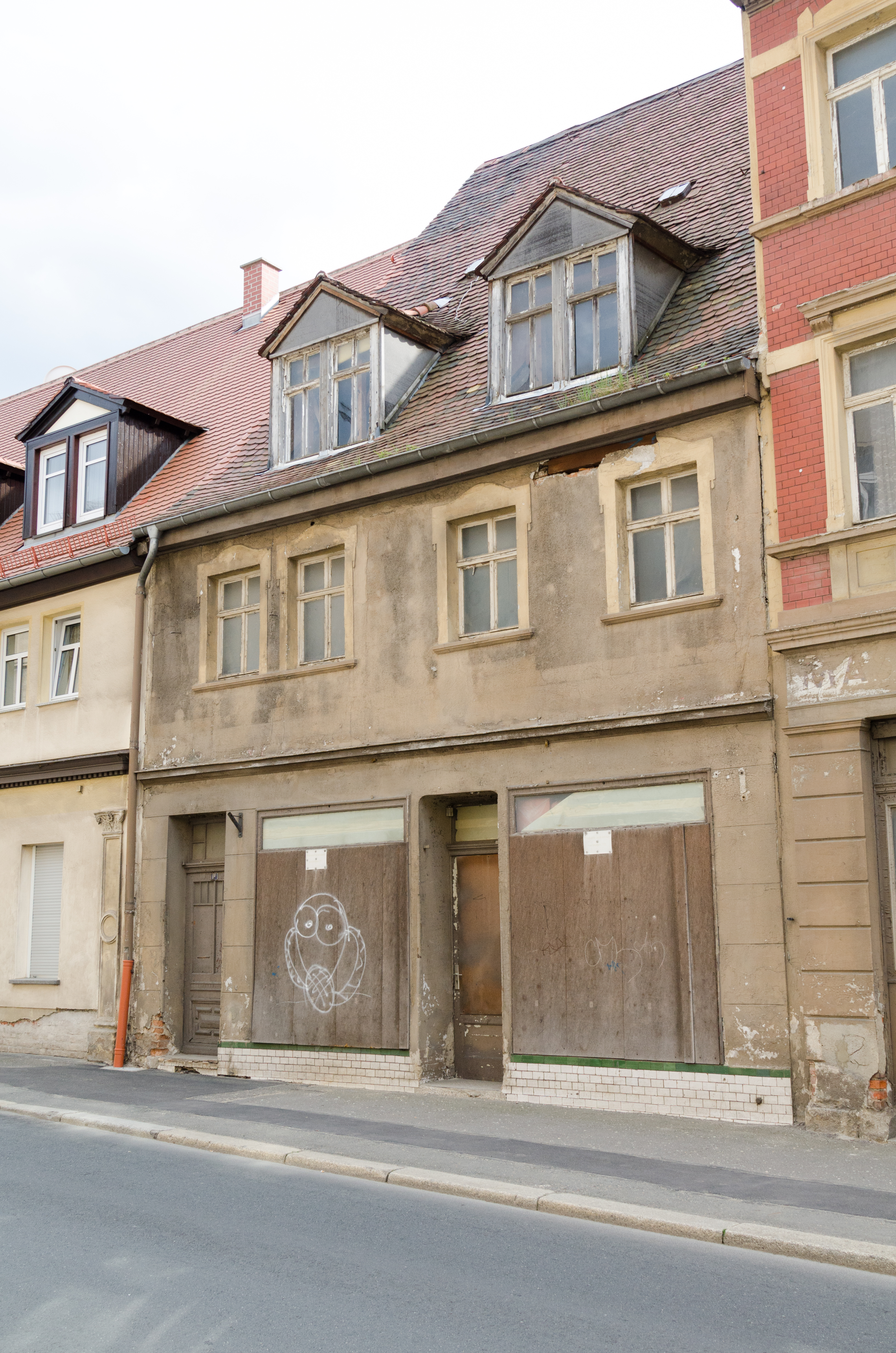 Zeitz, Kalkstraße 11